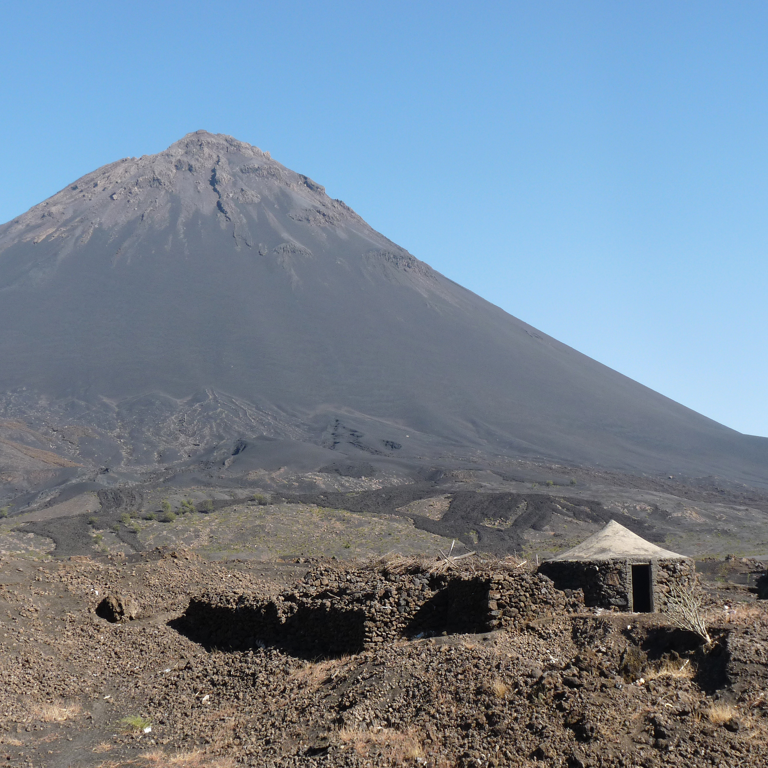 Pico do Fogo (Cap-Vert) : maison traditionnelle en pierre volcanique et chaume, et dont la silhouette évoque le volcan